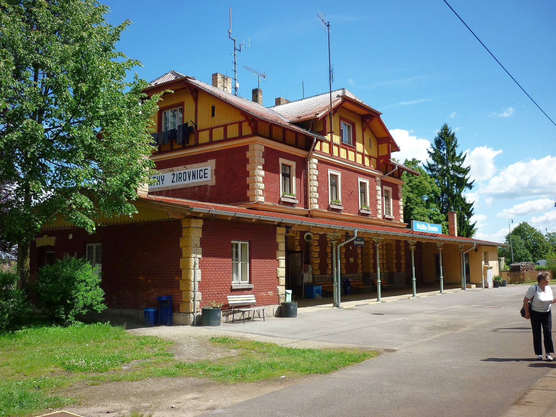 Železniční stanice Počátky - Žirovnice na trati 225